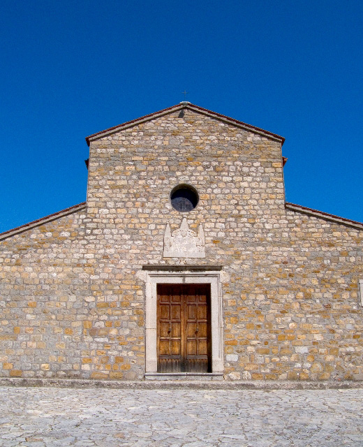 Eremo di San Liberatore, Torrecuso (BN), Italia